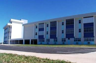 InteriorizaçãoNorteFluminense